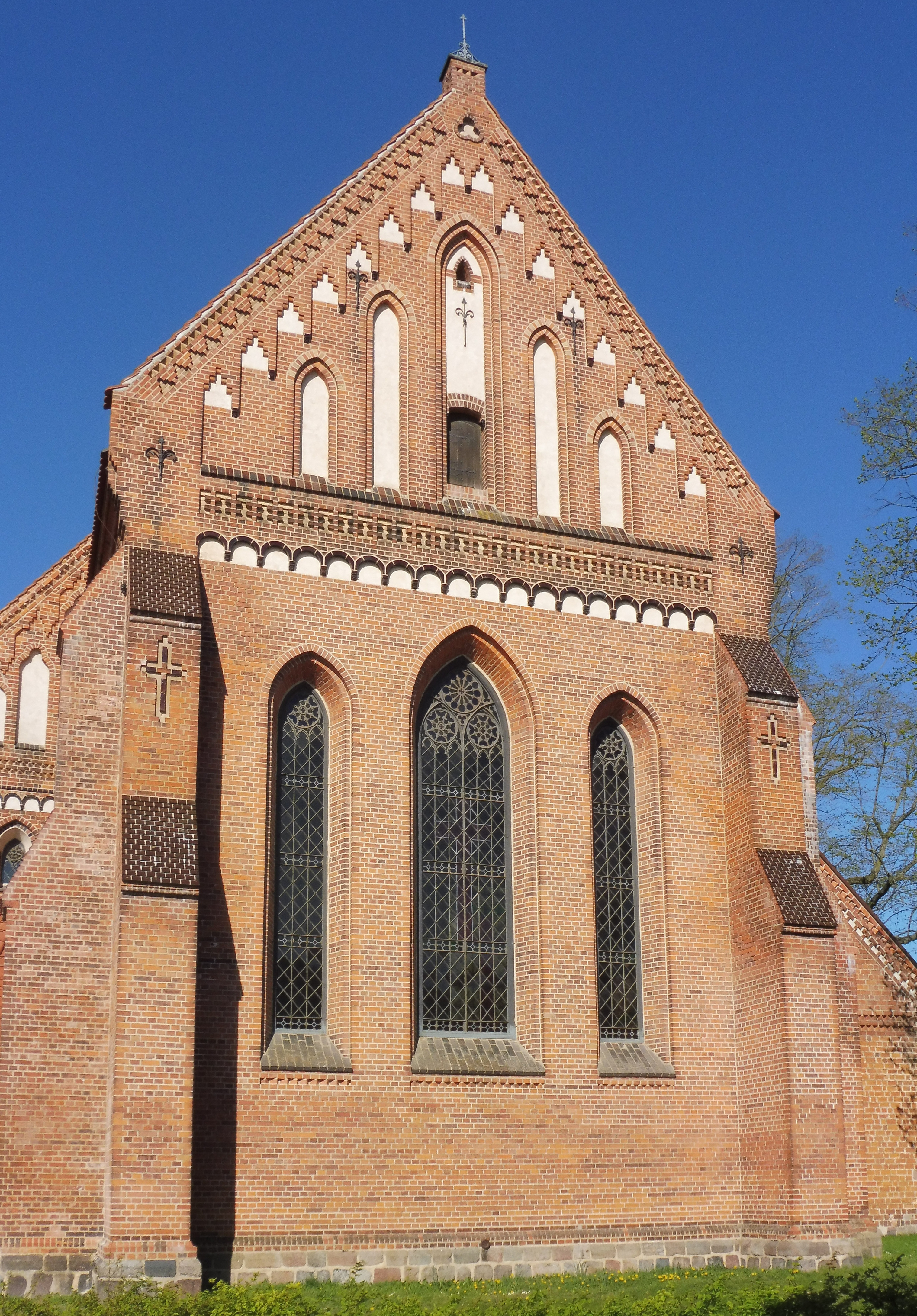 Östliche Chorfenster der Pfarrkirche St. Marien (Plau am See)